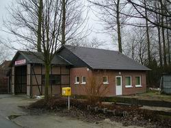 Gerätehaus der Löschgruppe Dorfwelver